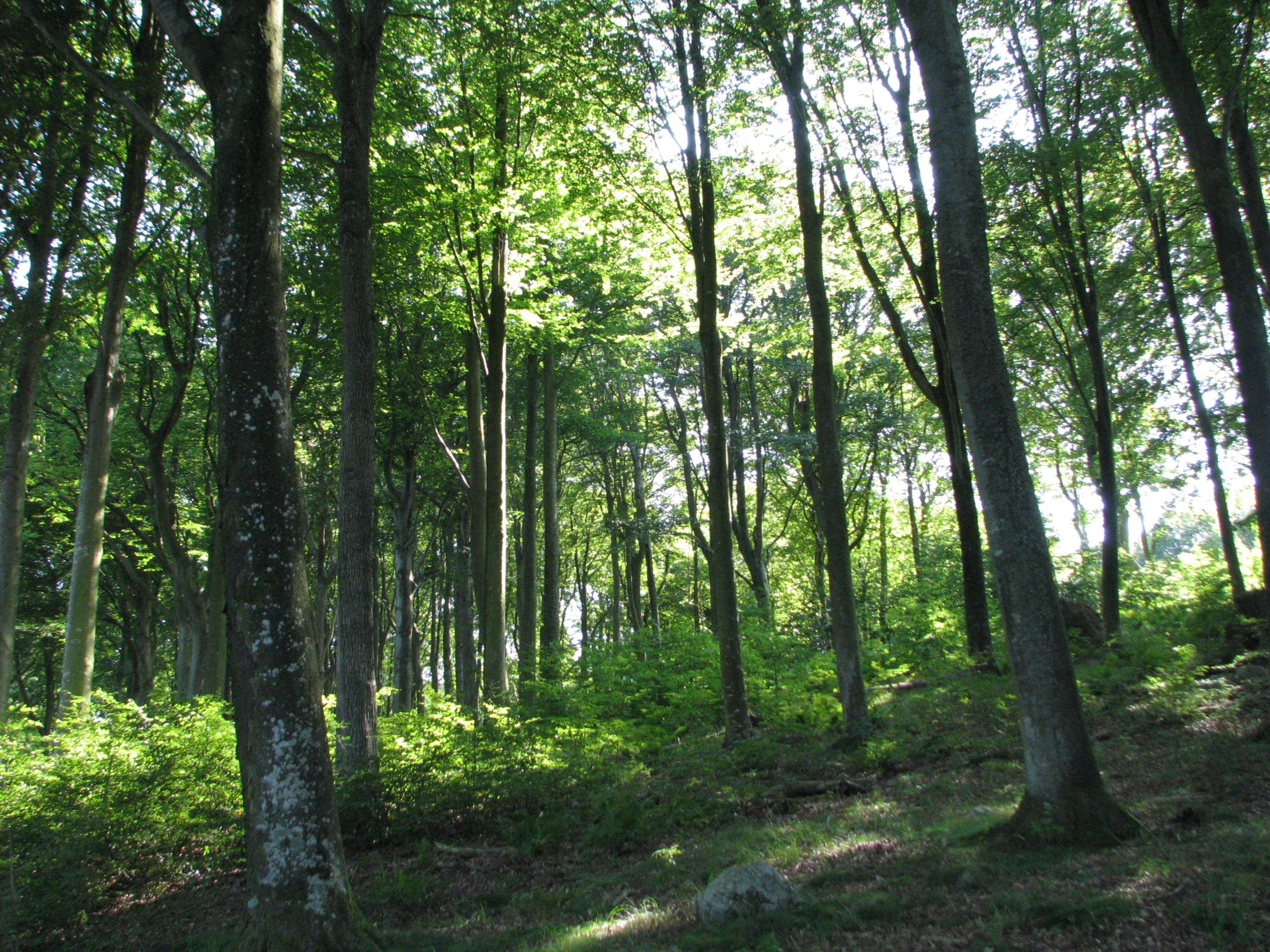 Buchenwald auf dem Kullaberg